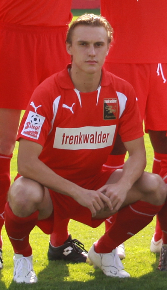 Finale im Österreichischer Fußball-Cup 2008/09 - Mannschaftsbild des Cupfinalisten FC Admira Wacker Mödling